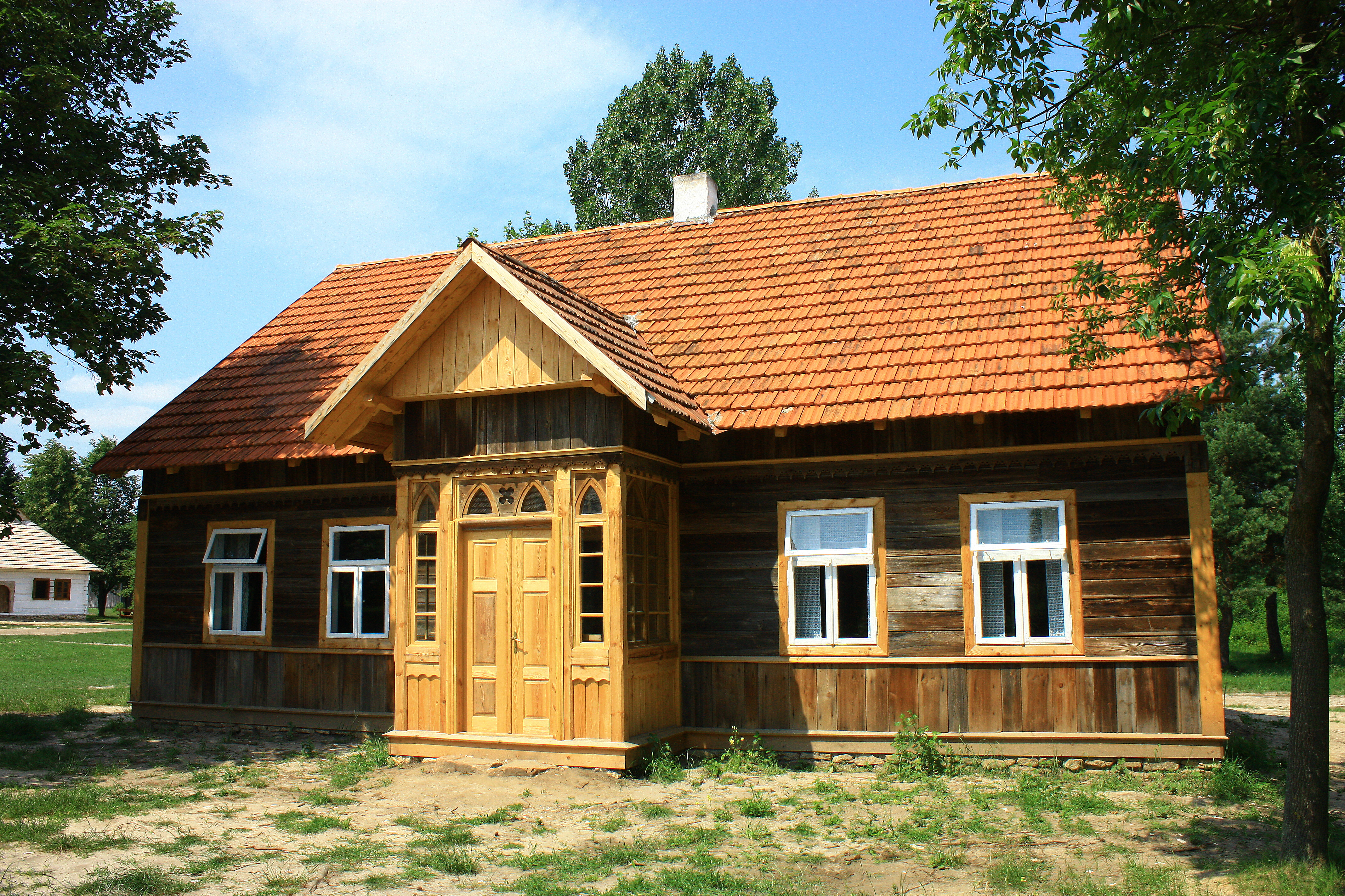 Tokarnia, teren parku etnograficznego Muzeum Wsi Kieleckiej